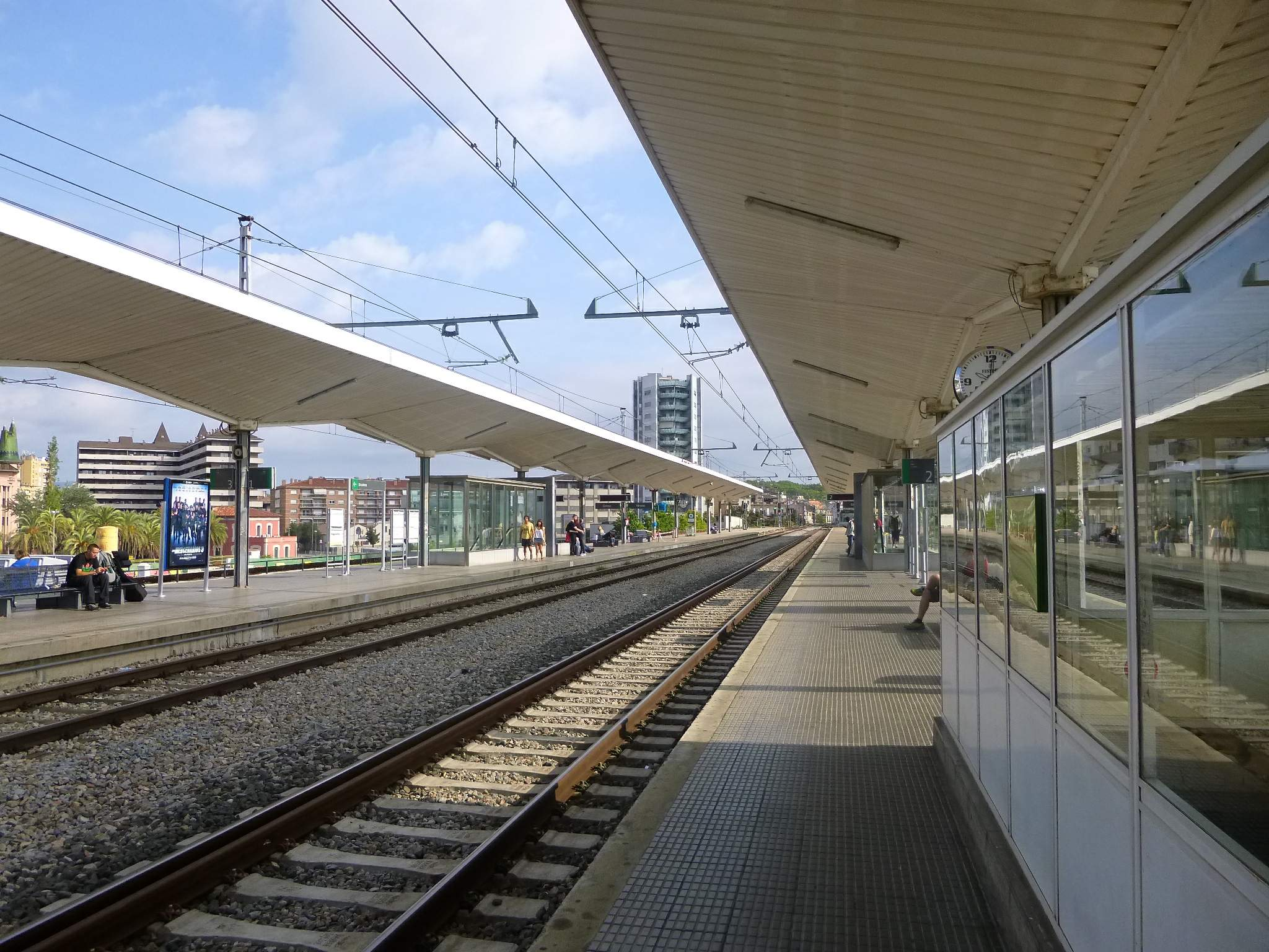 Girona - Estación de ADIF